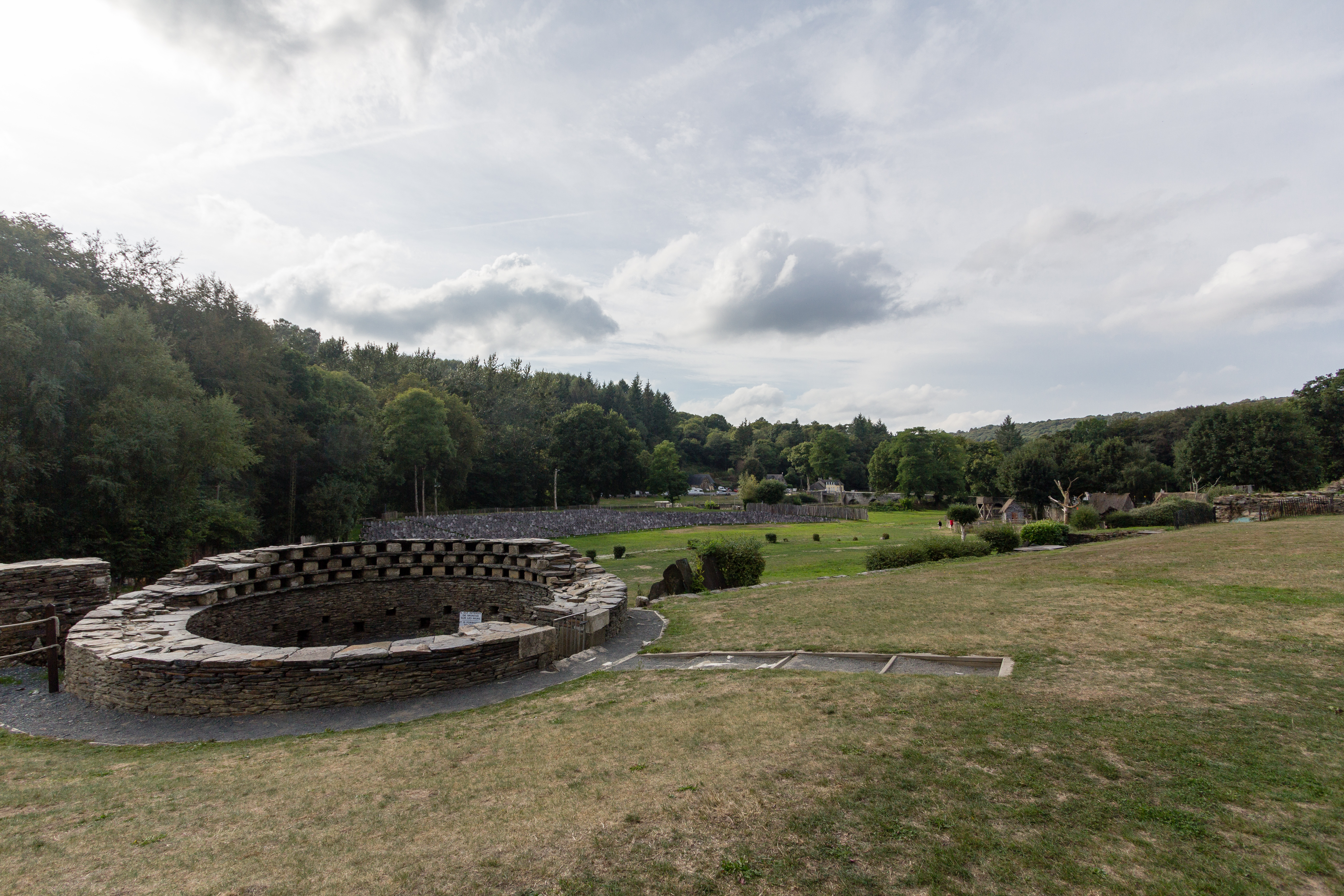 Ruines du pigeonnier de l'abbaye Notre-Dame-de-Bon-Repos (Saint-Gelven, France).